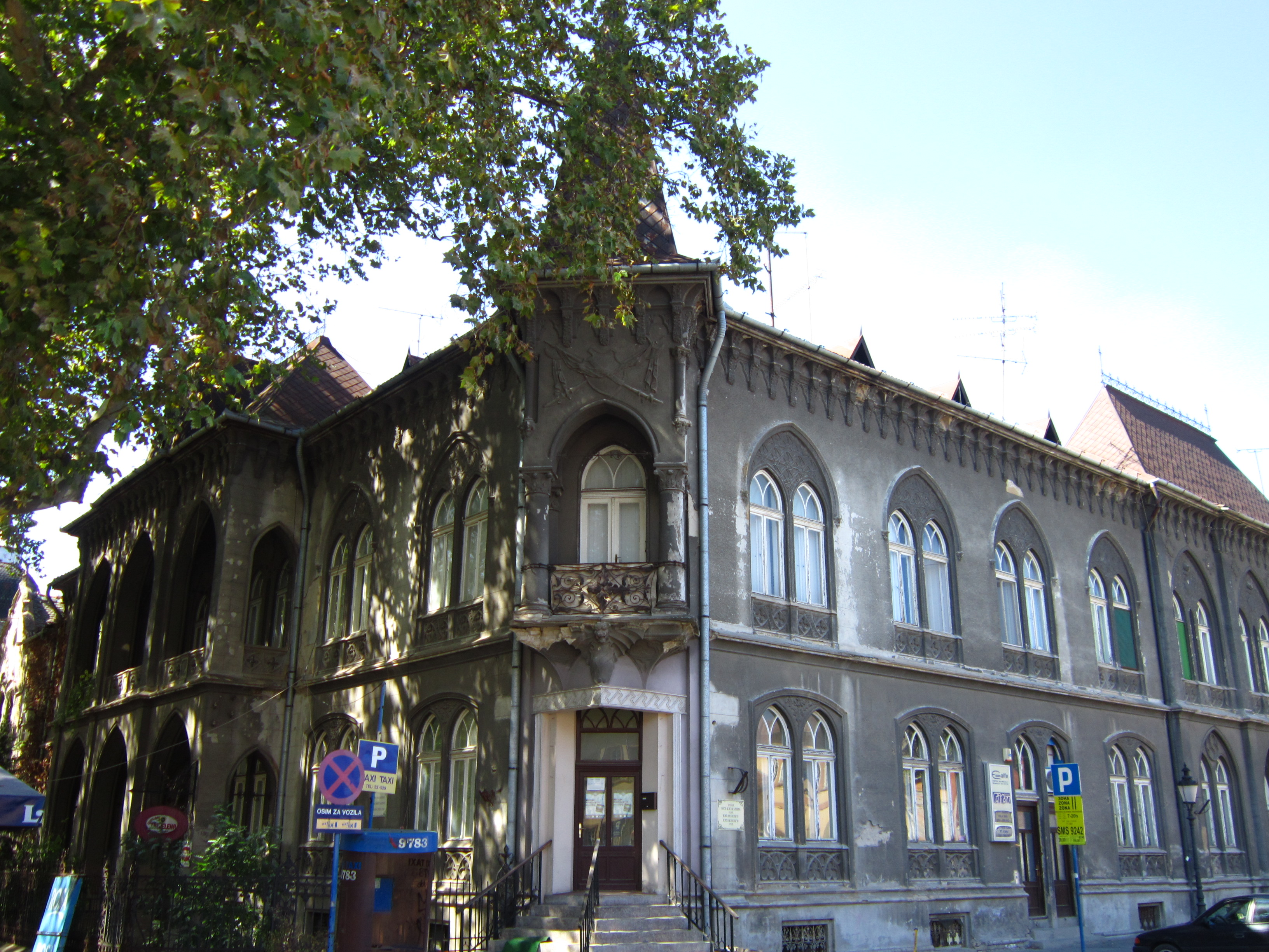 Зграда у парку Рајхл Ференца бр.13 , Суботица